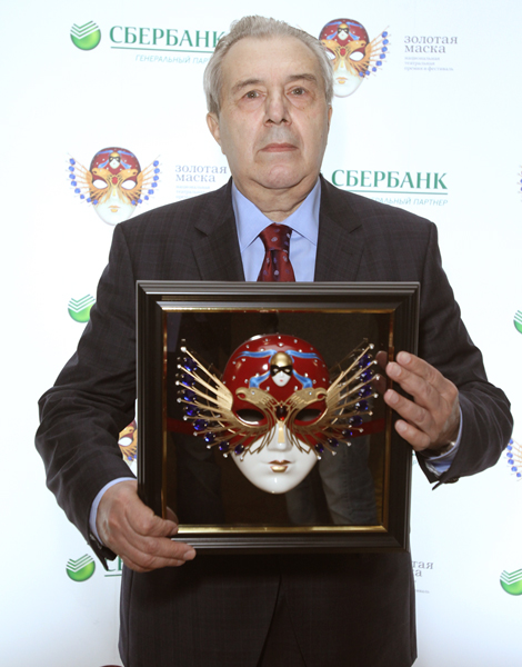 Церемония награждения премией «Золотая маска» — 2013 года.